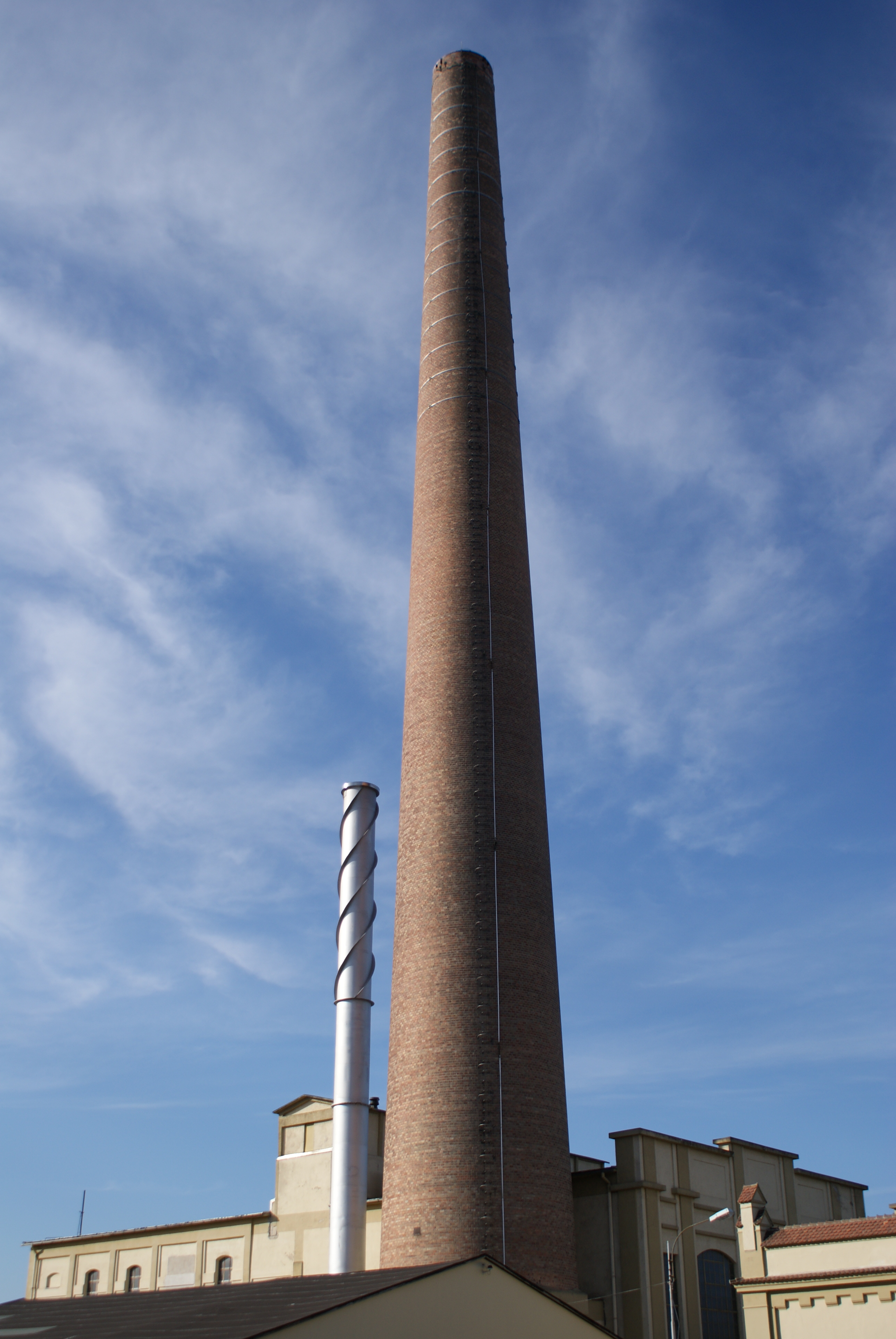 Der Schlot der Glanzstoff Austria kurz vor der Sprengung